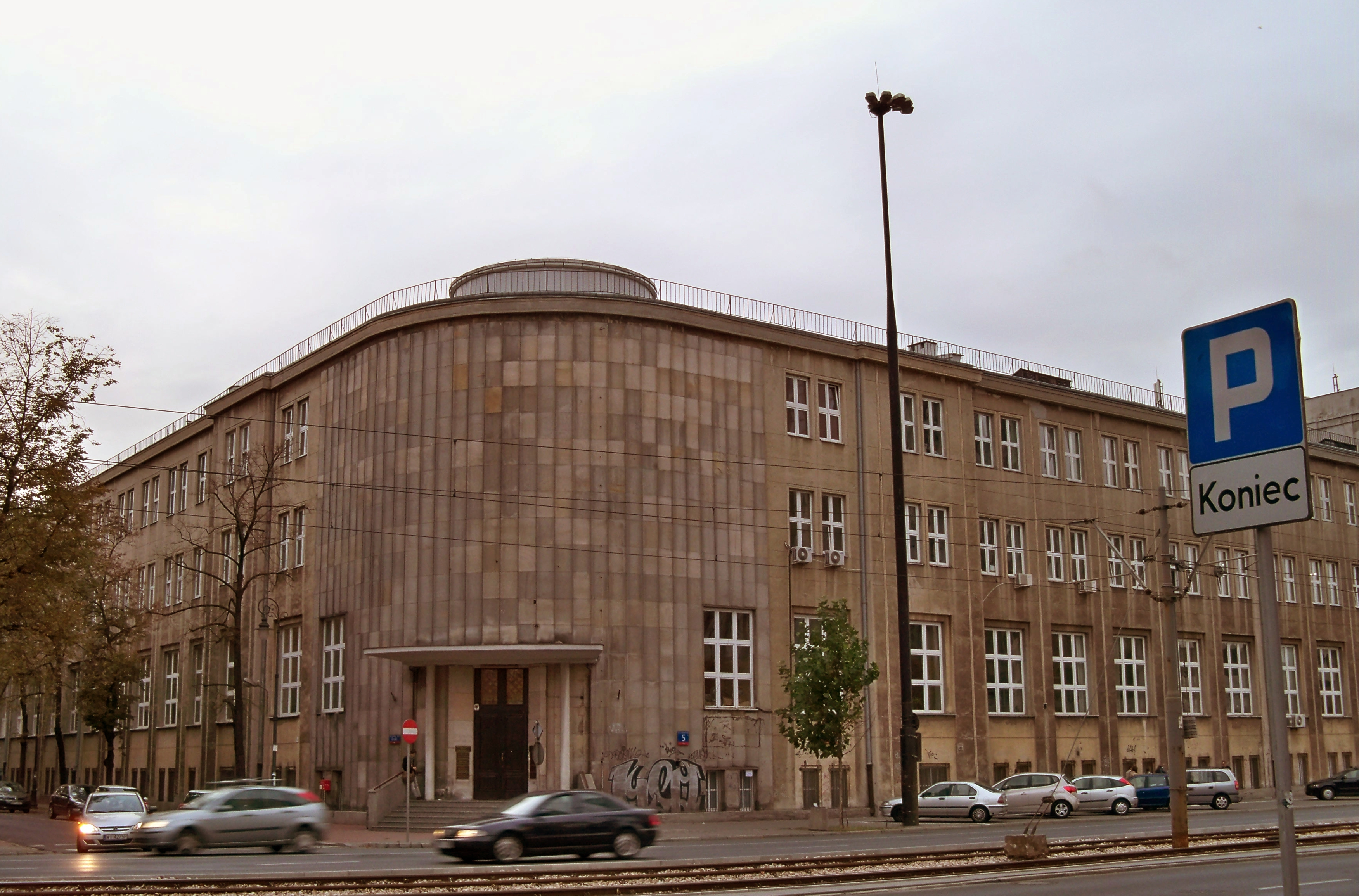 Collegium Anatomicum Warszawskiego Uniwersytetu Medycznego przy Szpitalu Dzieciątka Jezus w Warszawie. Ulica Chałubińskiego 5 róg W. Oczki.